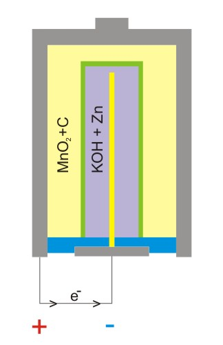 battery alcaline